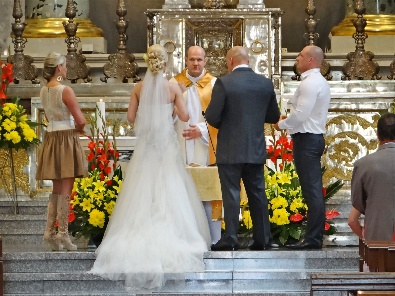 Cérémonie à la cathédrale de Vilnius La fête du couronnement du roi Mindaugas, fondateur de l’État lituanien est le 6 juillet, un vendredi en 2012, ce qui a permis aux lituaniens de bénéficier d'un long week-end. Beaucoup en ont profité pour se marier. Dans des endroits, parfois inattendus de la ville, on pouvait rencontrer des mariés et leurs invités pour prendre des photos et faire la fête.